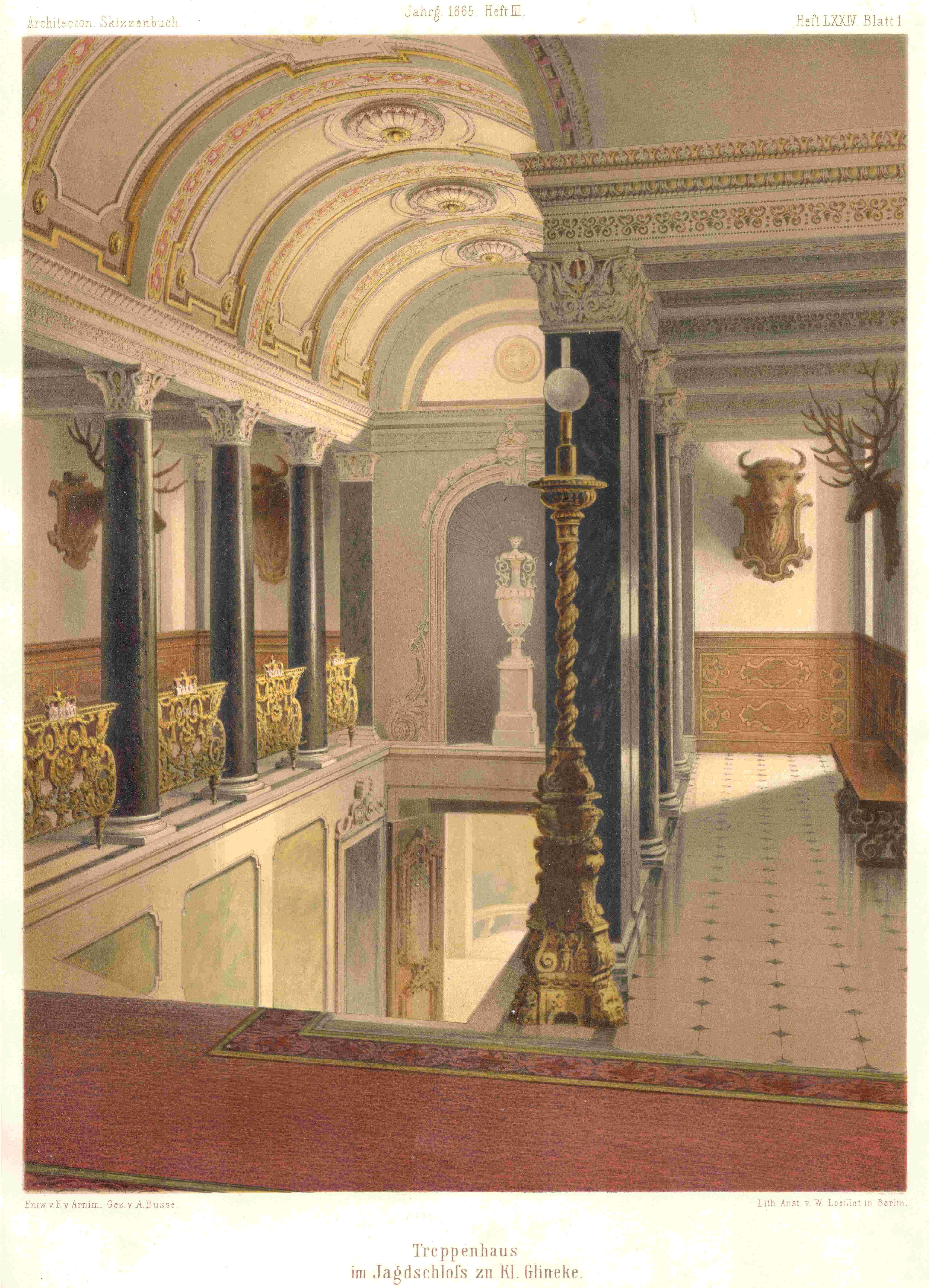 Berlin, Jagdschloss Glienicke, Treppenhaus